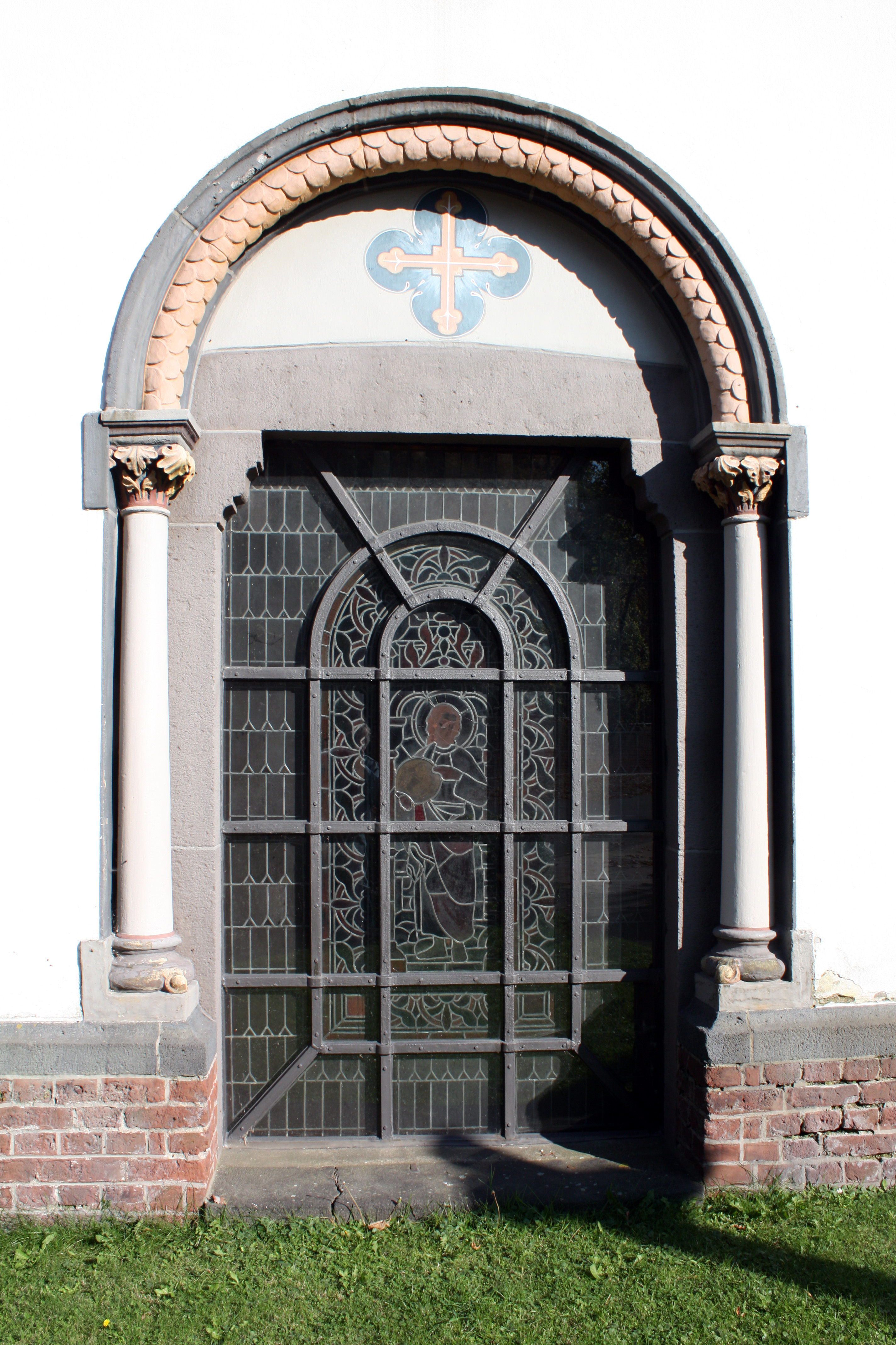 St. Johann Baptist, Kendenich. Turmfront, wahrscheinlich der ehemalige Eingang